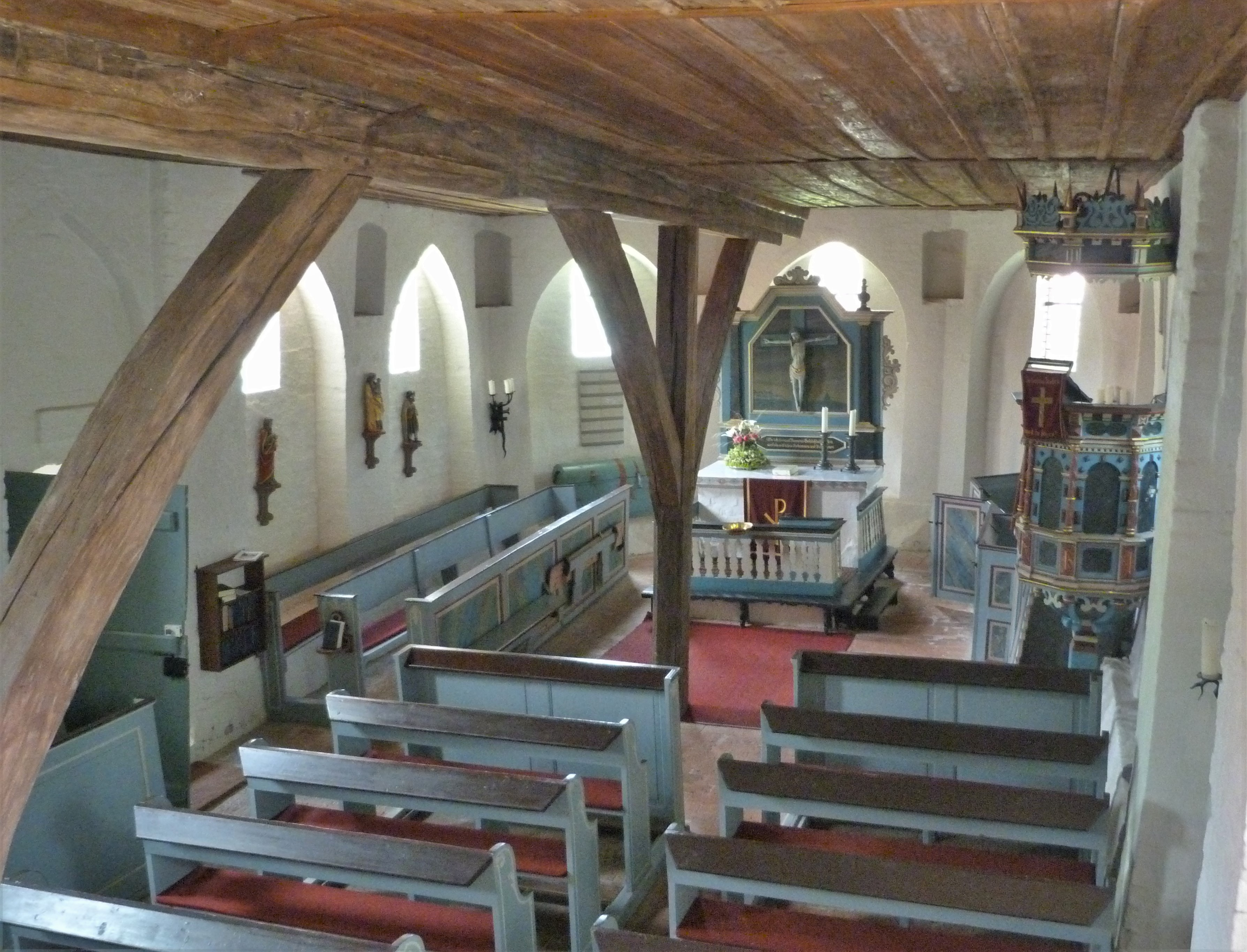 Blick in das Kirchenschiff der Burgkapelle in Gollern im niedersächsischen Landkreis Uelzen.